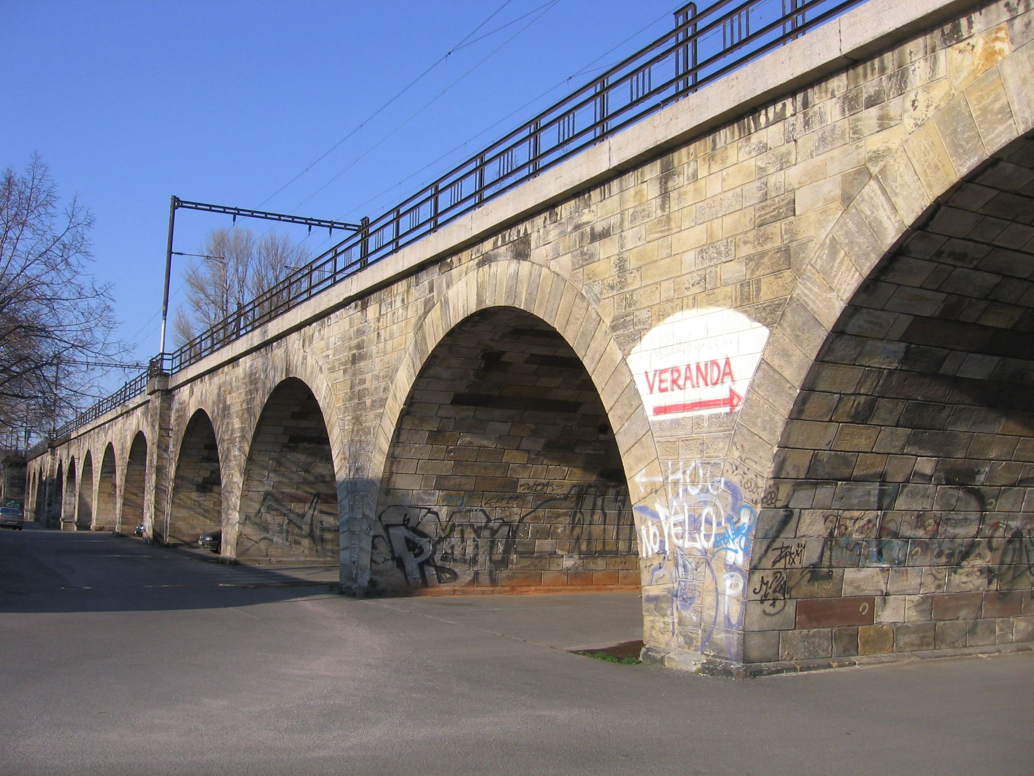 Negrelliho viadukt nad ostrovem Štvanice